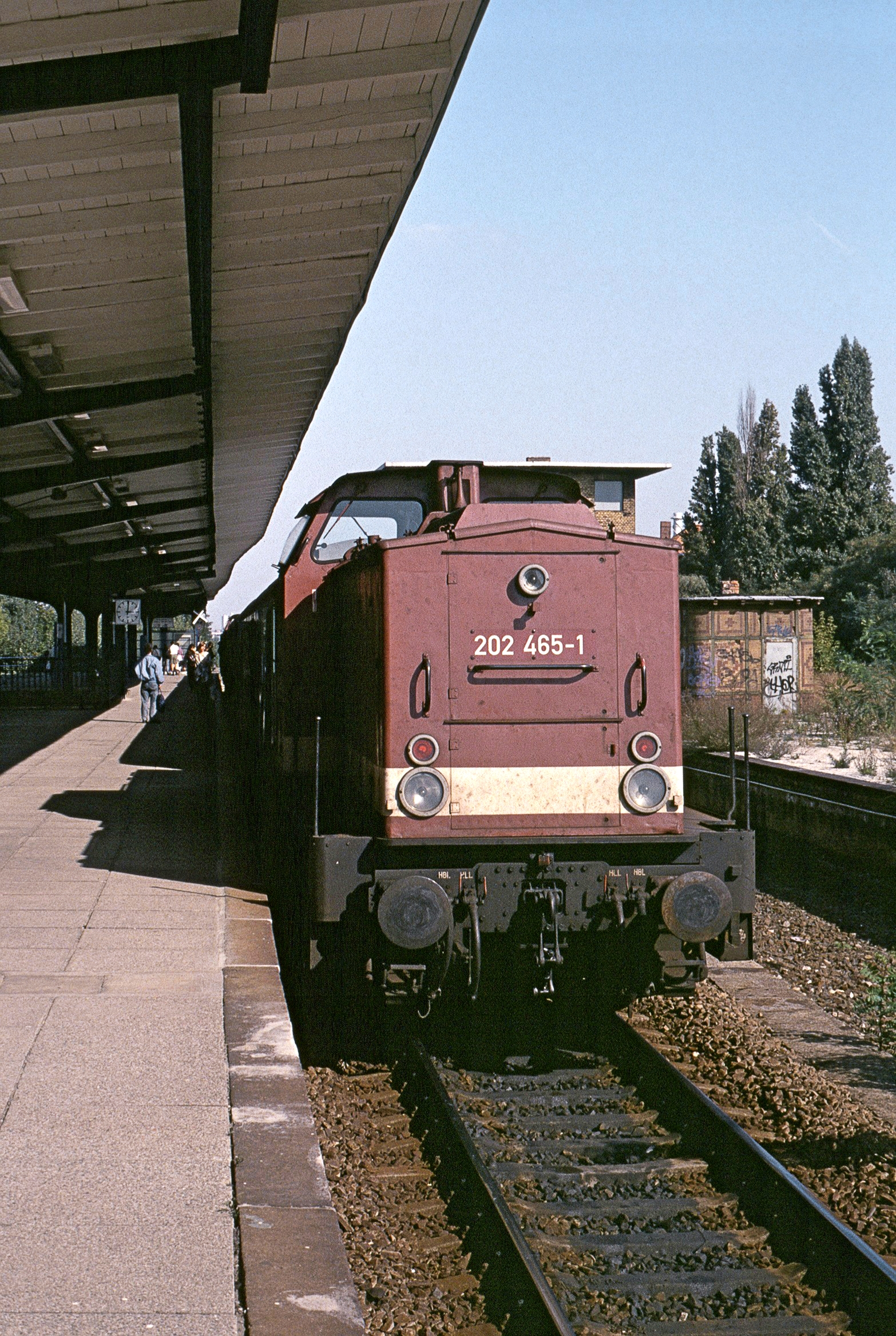 Regionalzug am Ringbahnsteig Jungfernheide